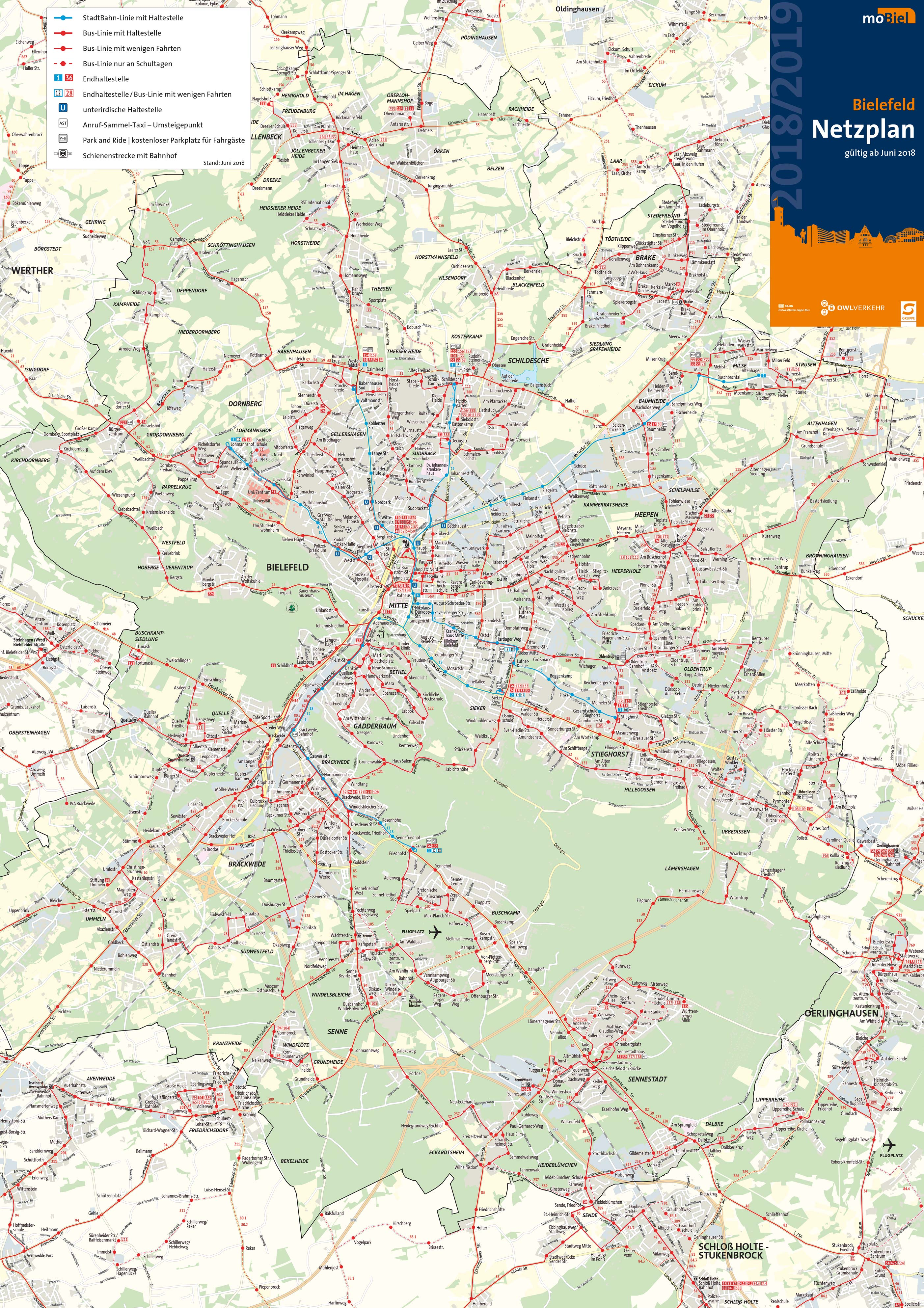 Netzplan von Bielefeld